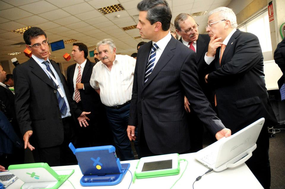 El presidente de los Estados Unidos Mexicanos, Enrique Peña Nieto, el presidente de la República Oriental del Uruguay, José Mujica, el Gerente General de Plan Ceibal, Gonzalo Pérez Piaggio, el subsecretario de la Presidencia, Diego Cánepa, y el ministro de Educación y Cultura, Ricardo Ehrlich.